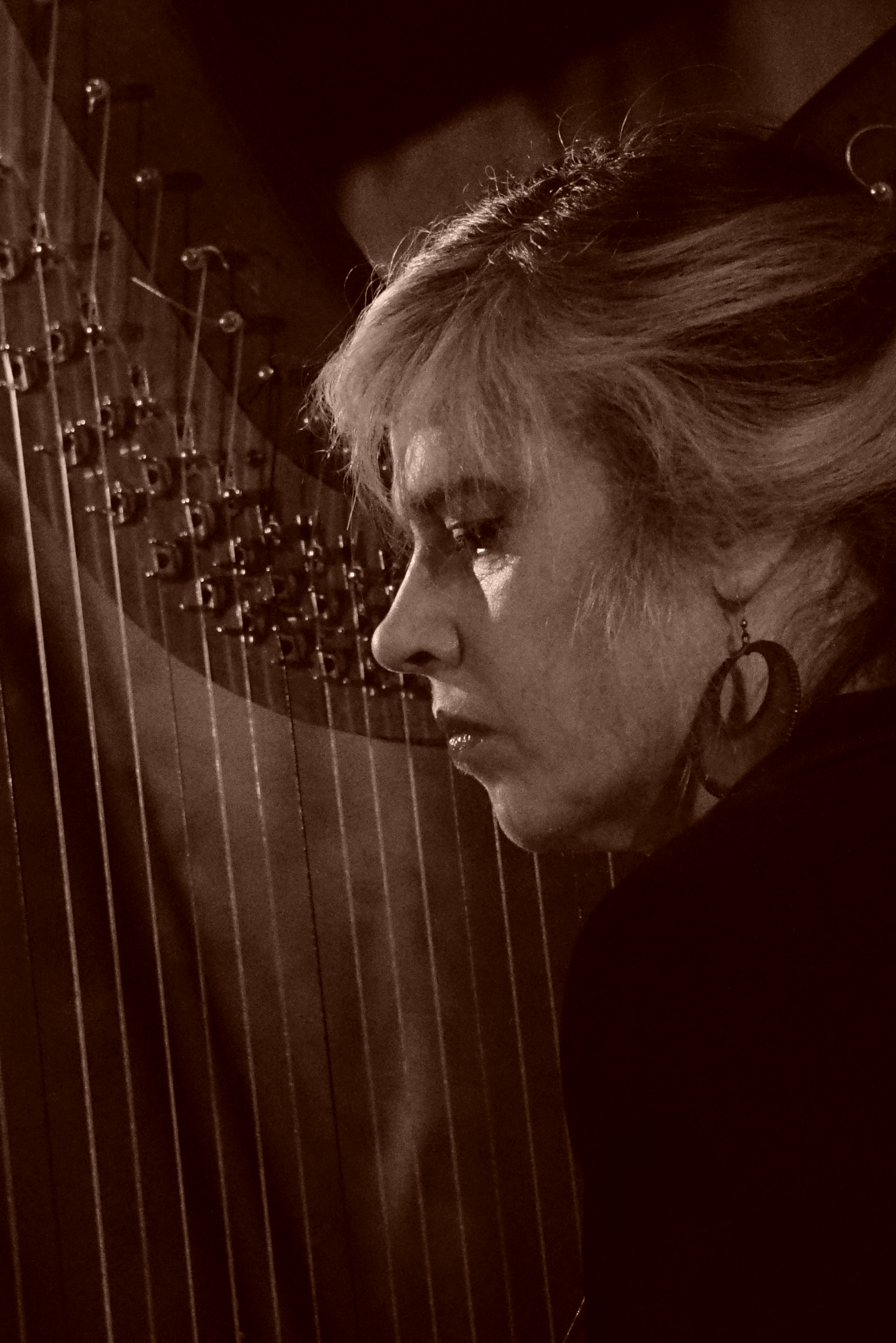 concert Errances et resonnances au bar de la COmédie.